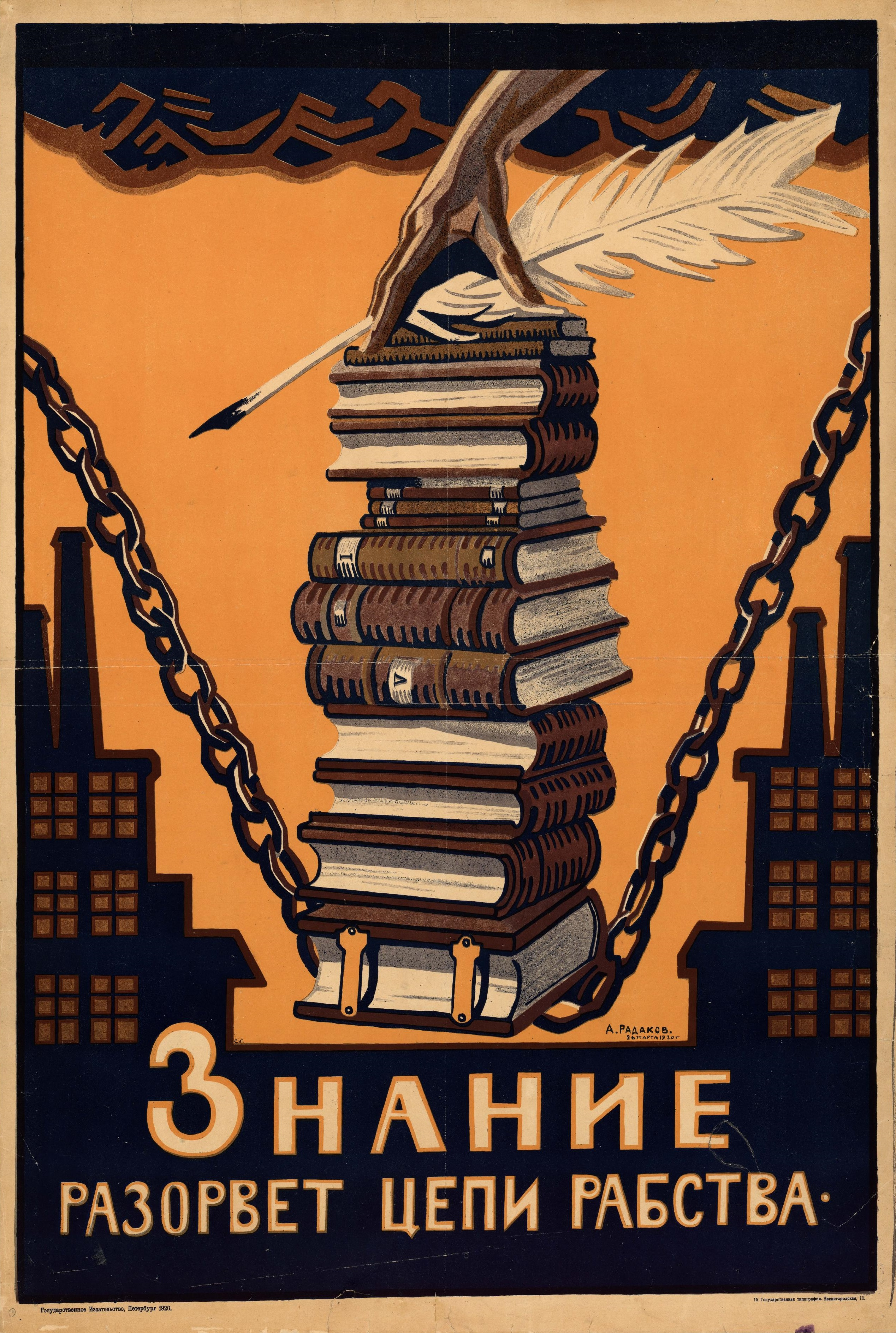 Плакат «Знание разорвёт цепи рабства» Петербург: Государственное издательство, 1920 Хромолитография, 89×61 см.